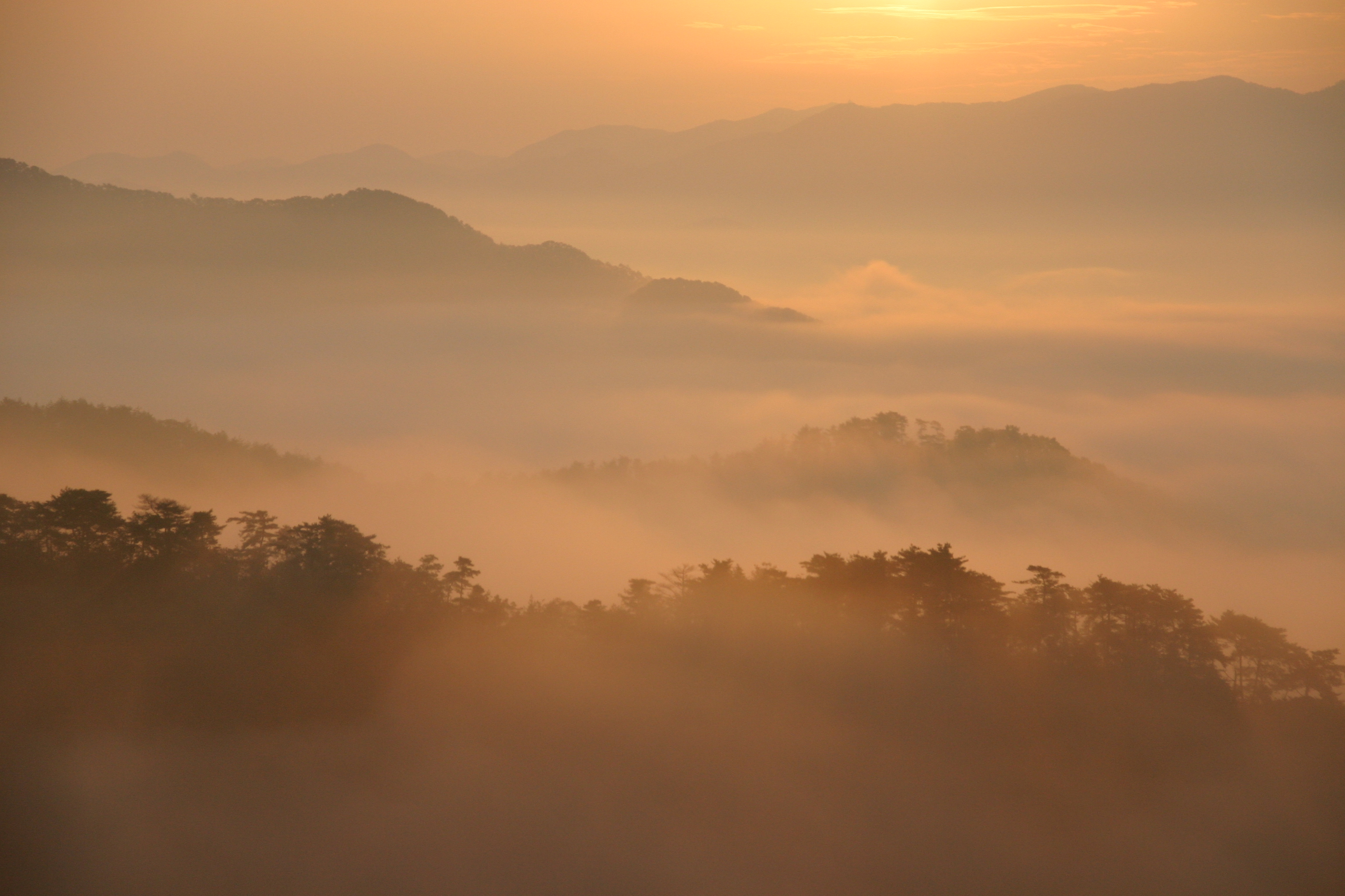 雲海２ ～photo by Autumn Snake 【おぉたむ すねィく投資部門】テクニカル分析担当 唐山健志郎